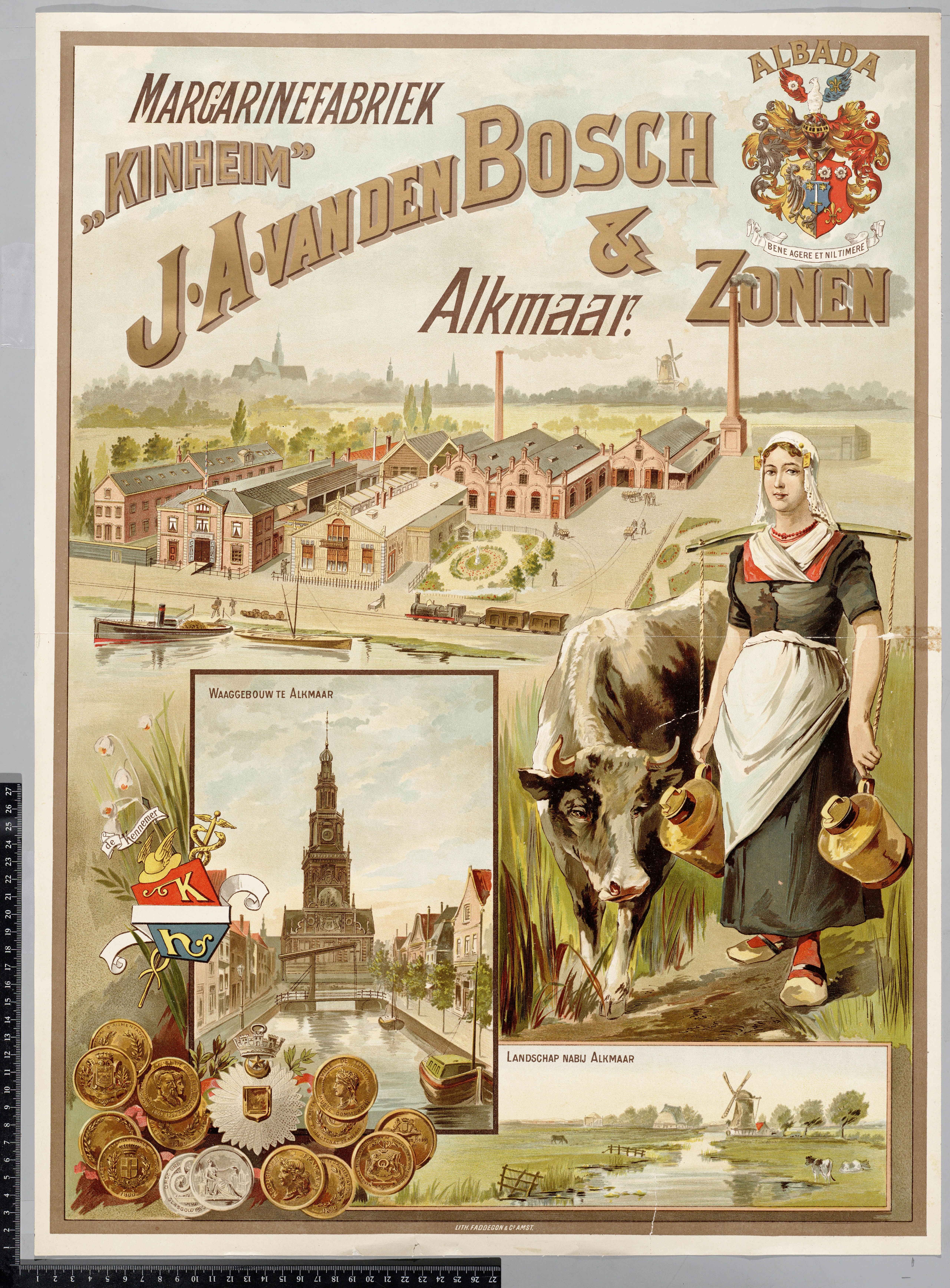 "Margarinefabriek Kinheim" van J.A. van den Bosch & Zonen, Alkmaar. Reclameposter met in het midden de fabriek aan de Helderse weg en het spoorlijntje. Daaronder de Waag te Alkmaar en rechtsonder een landschap nabij Alkmaar. Middenrechts een melkmeisje. Linksboven een wapenschild met daarboven het merk Albada. Catalogusnummer: PR 1008001 Vervaardiger: onbekend Datum: 1890 Collectie Regionaal Archief Alkmaar